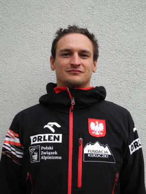 Fotografia Adama Bieleckiego Polskiego Himalaisty autora pierwszego zimowego wejścia na Gasherbrum I w 2012